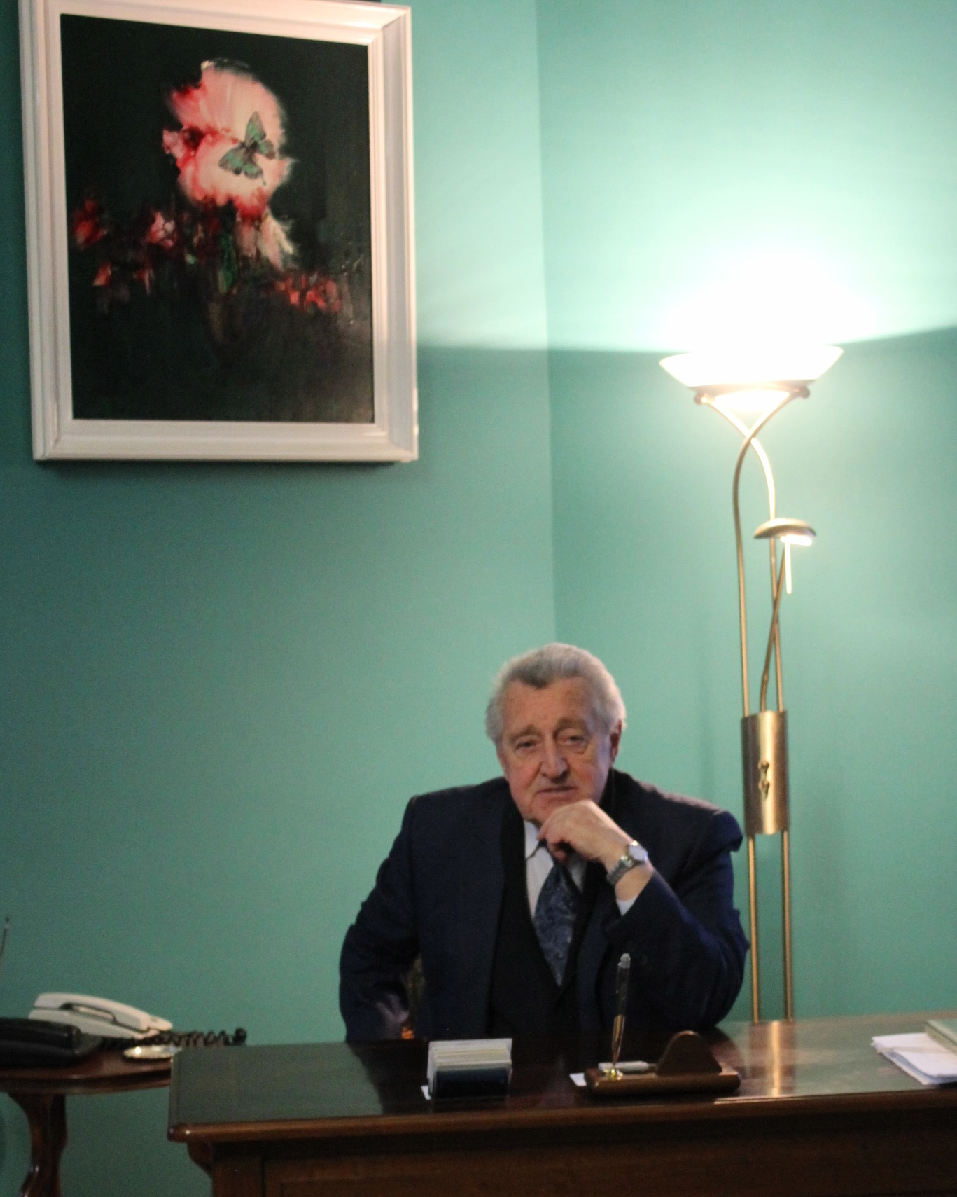 Лукашев Володимир Анатолійович. художній керівник Національної філармонії України